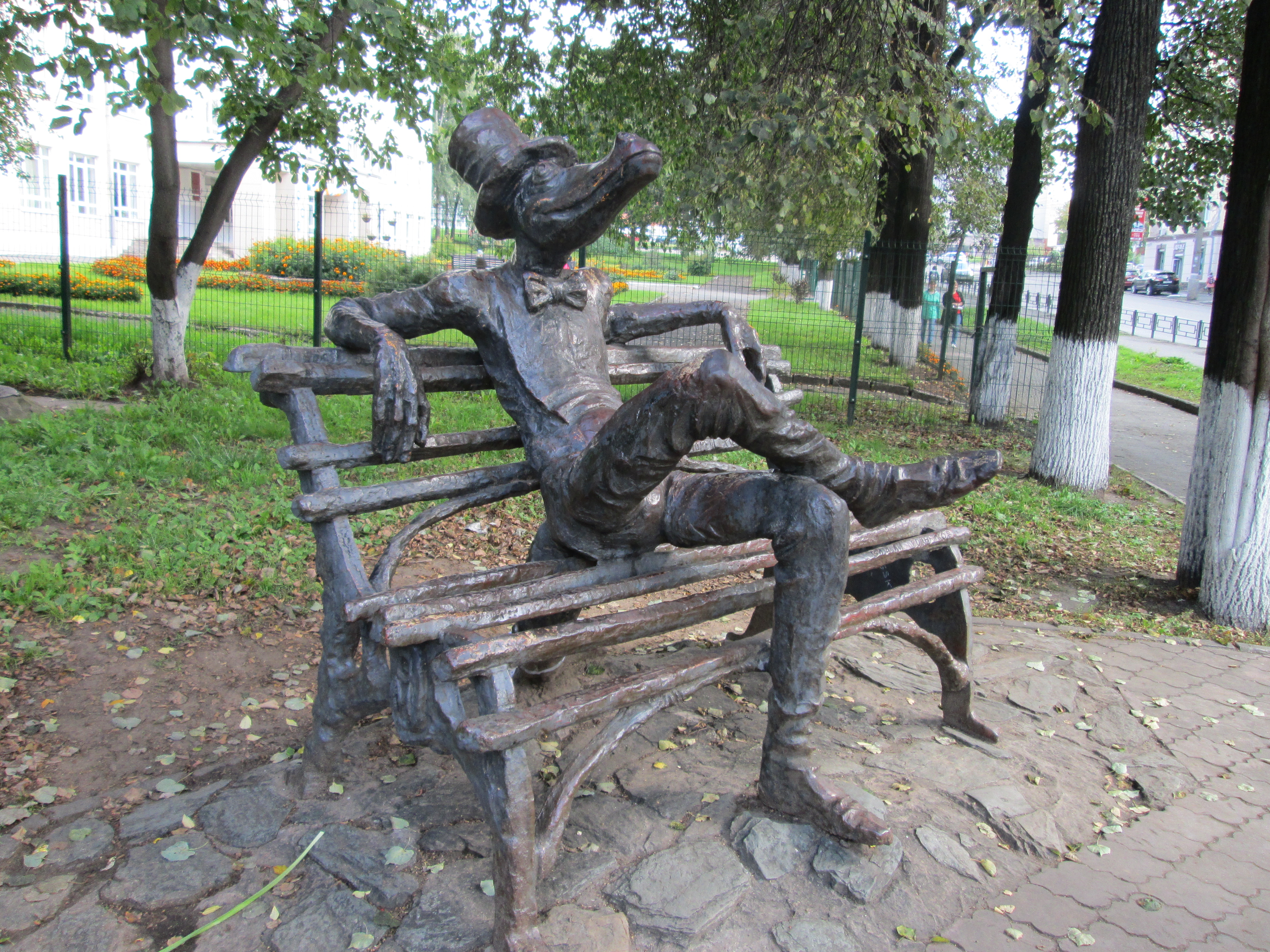 Перекрёсток улиц Советской и Коммунаров в г.Ижевск